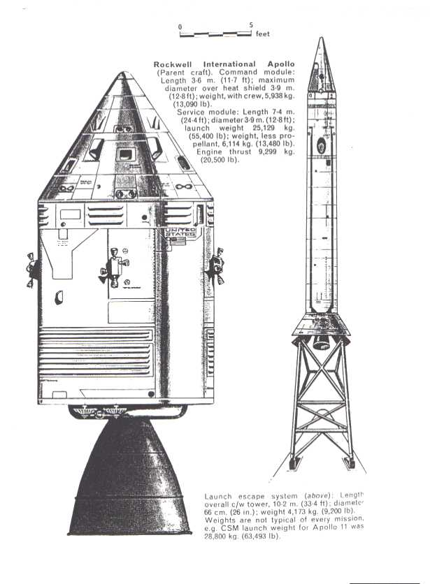 Apollo Launch Escape System (LES) neben Apollo 10 CSM. Skizze